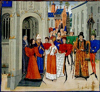 Baudouin II de Hainaut et Ide de Louvain